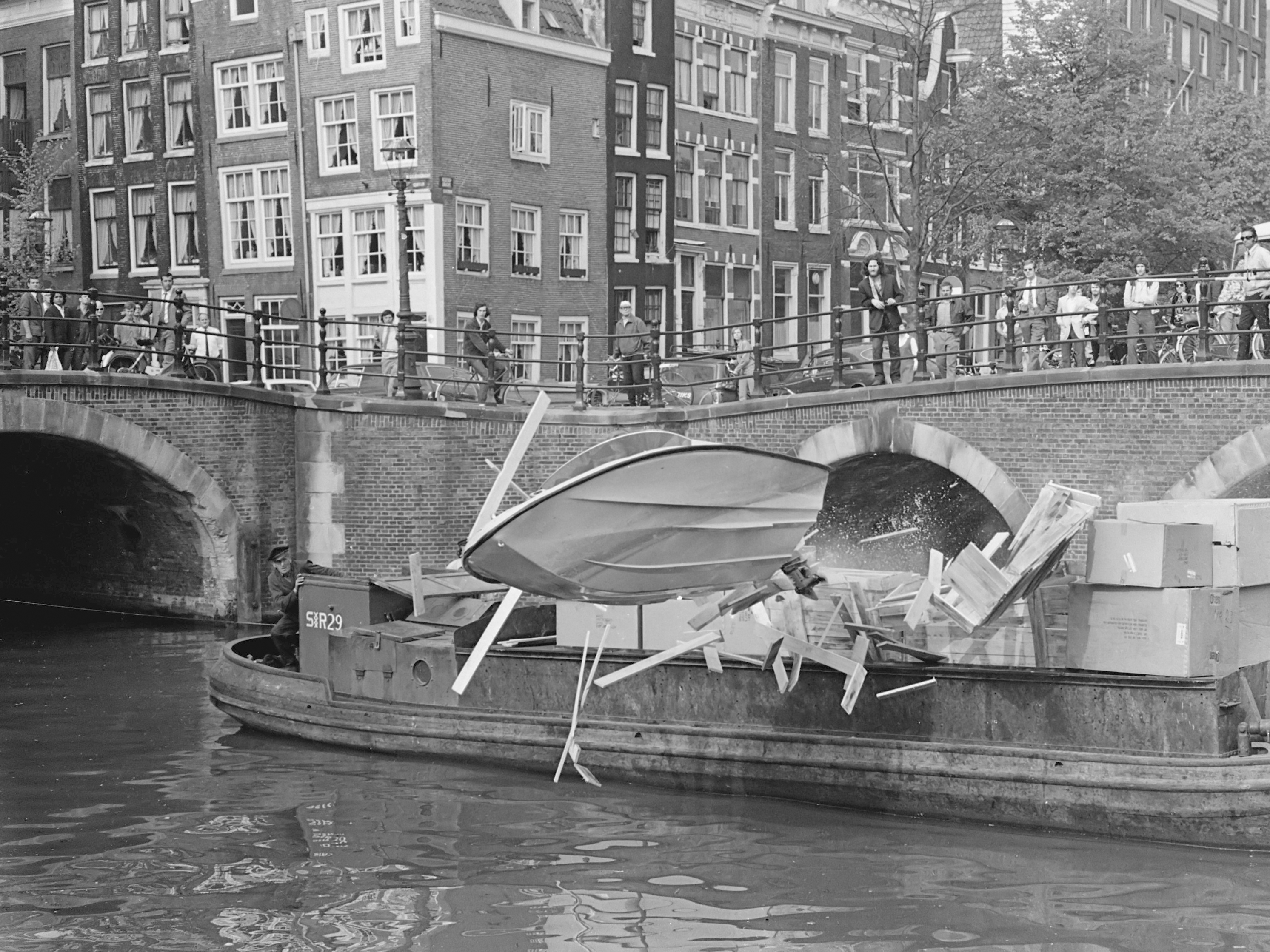 Filmopnamen voor Engelse film "Puppet on a chain" in Keizersgracht, Amsterdam; Wim Wagenaar gaat met een speedboot door kisten, die op een zolderschuit liggen 14 mei 1970